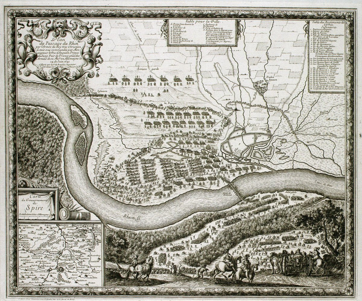 (Kupferstich). Originalbeschreibung: Plan du passage du Rhin par l'Armée du Roy très Chrestien Louis XIV., Commandée par Monseigneur le Duc d'Anguien Prince du Sang, Pair de France, General des Armée de Sa. M. en Allemagne le 19. de Juin 1645